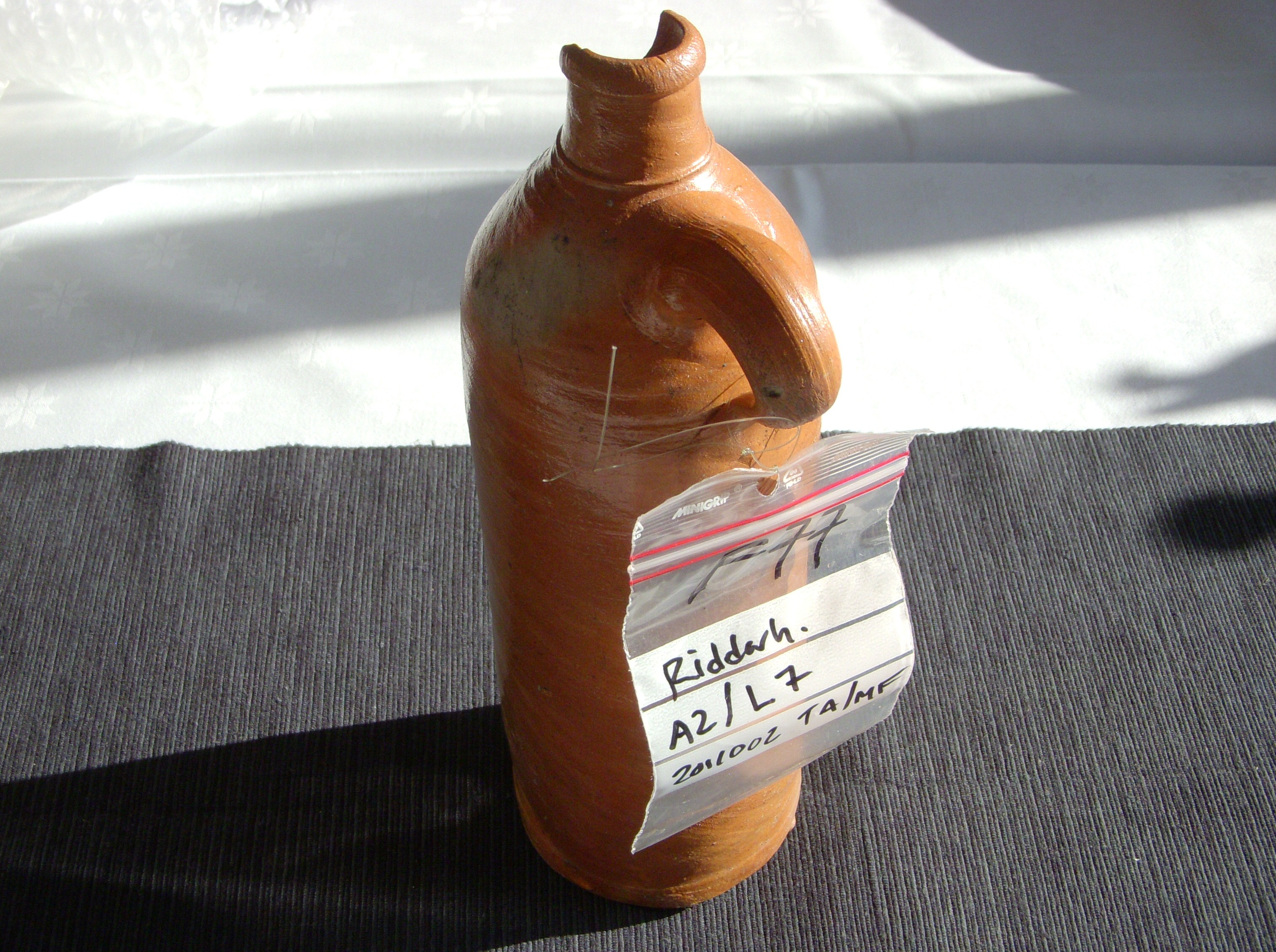 Arkeologiska utgrävningar i samband med Citybanan på Riddarholmen, ett Selters-krus.